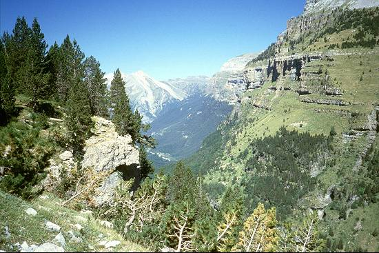 Val de Ordesa in de Spaanse Pyreneeën — Parque Natural de Posets-Maladeta, Aragón.